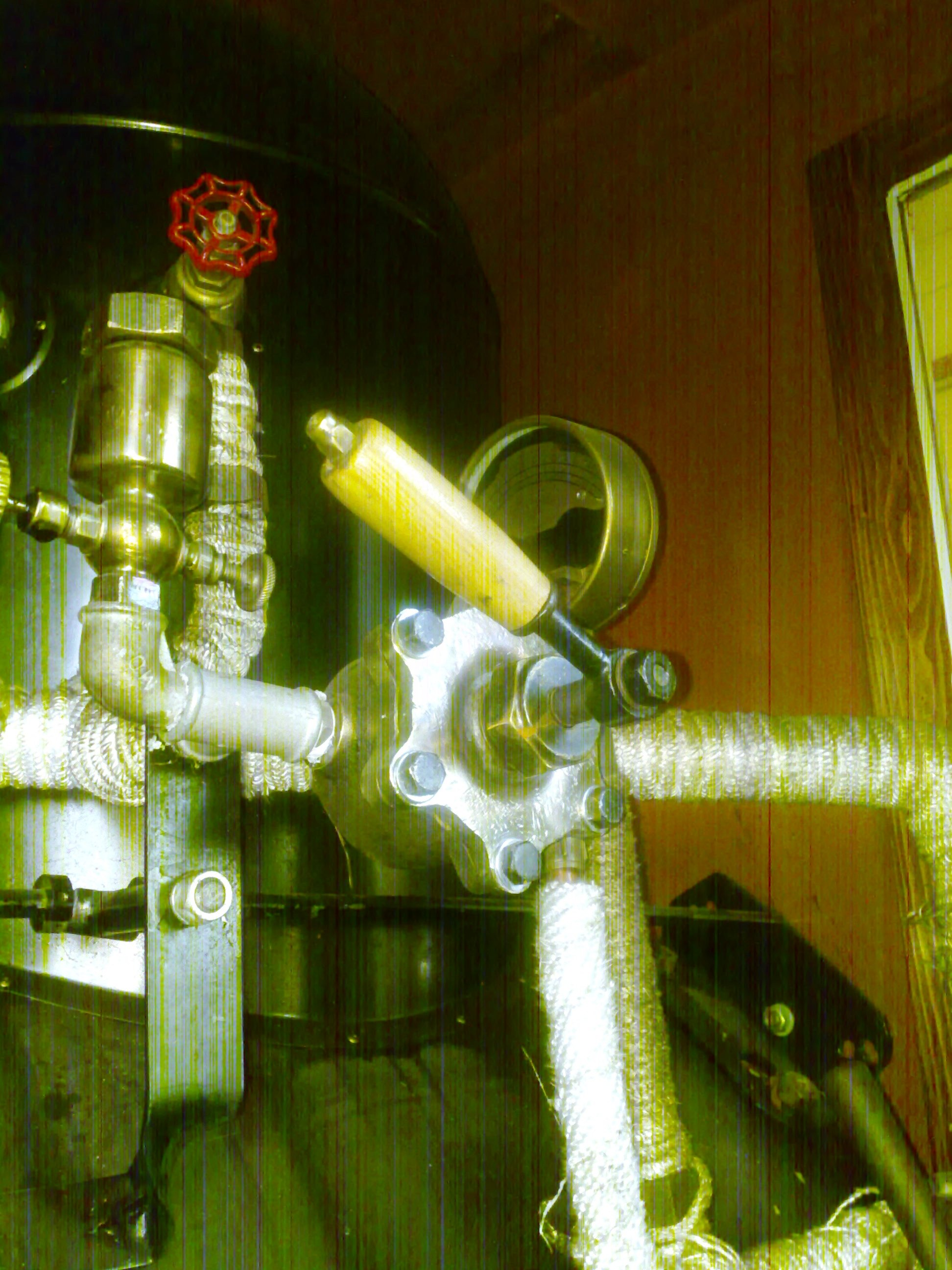 Porter-kapearaidehöyryveturin höyryjarrun käyttöventtiili kahvoineen